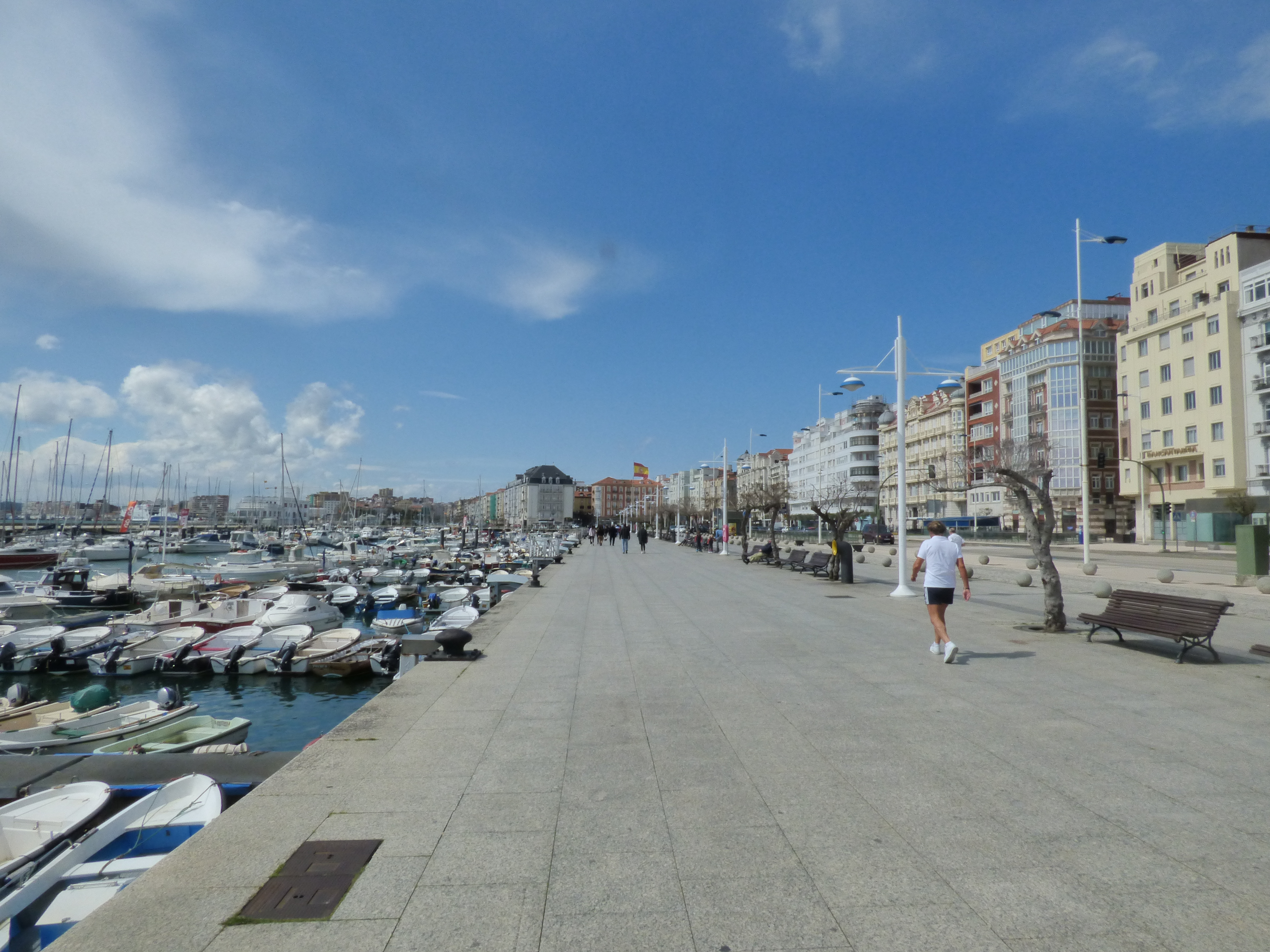 Vista de Puertochico y Castelar en abril